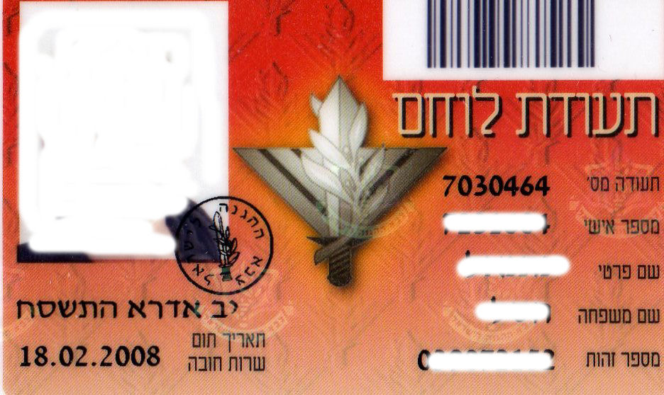 זו תעודת לוחם בצה"ל.